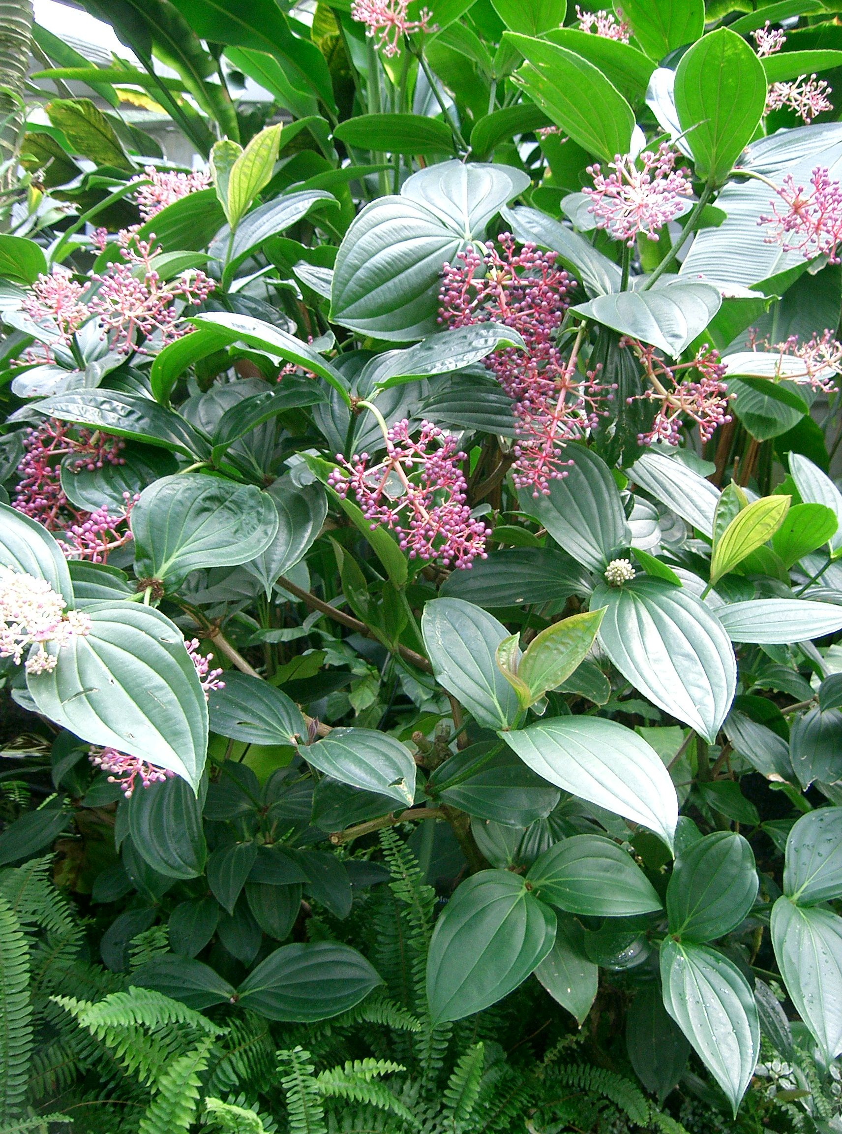 Scientific name Medinilla speciosa Place:Osaka-fu Japan